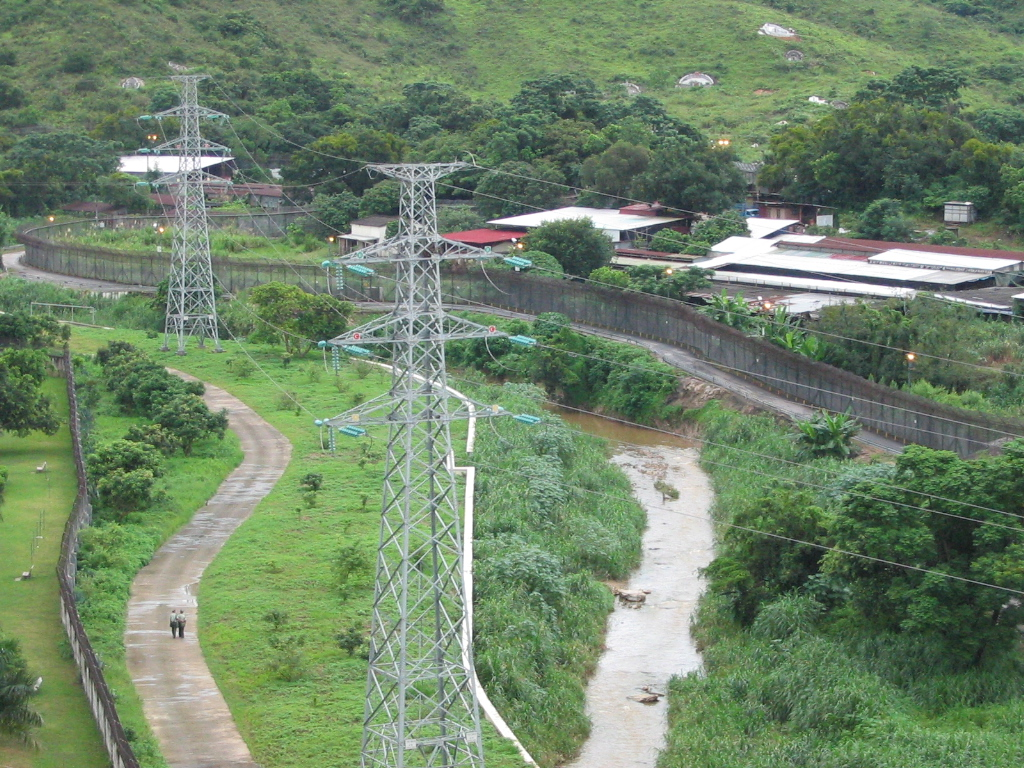 Shenzhen & S.A.R. Hong Kong border - view from Shenzhen, Luo Hu District - July 2005